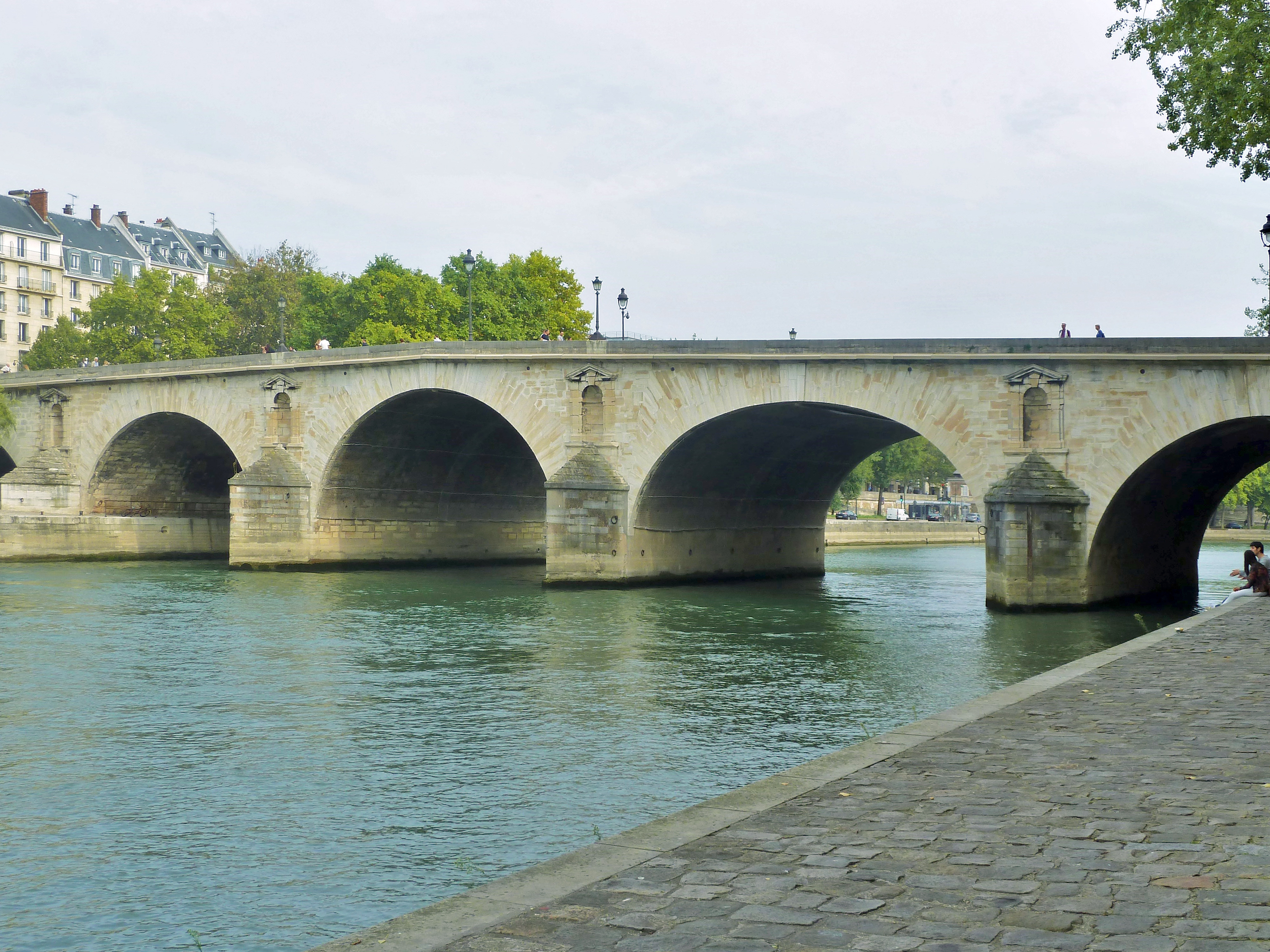 Paris - Pont Maire